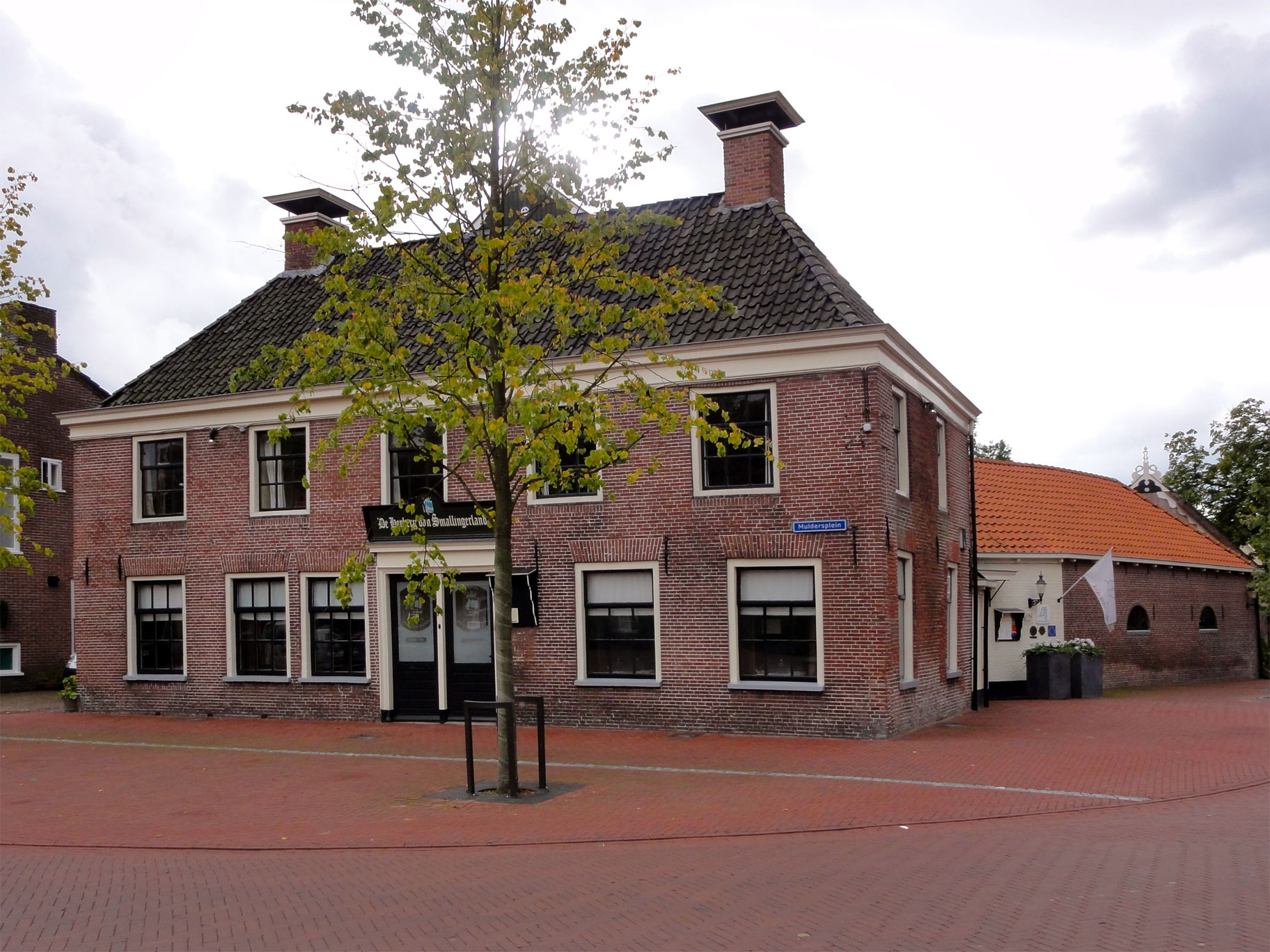 Het Wapen van Smallingerland Muldersplein 2 Rottevalle